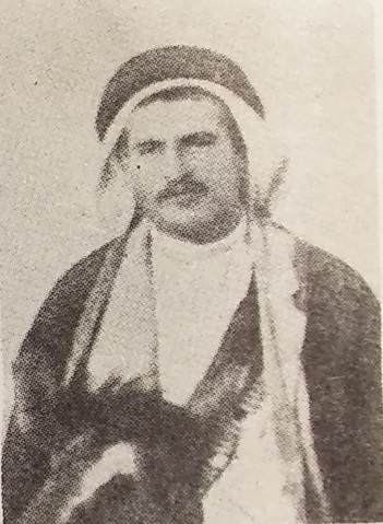 מאיר חזנוביץ